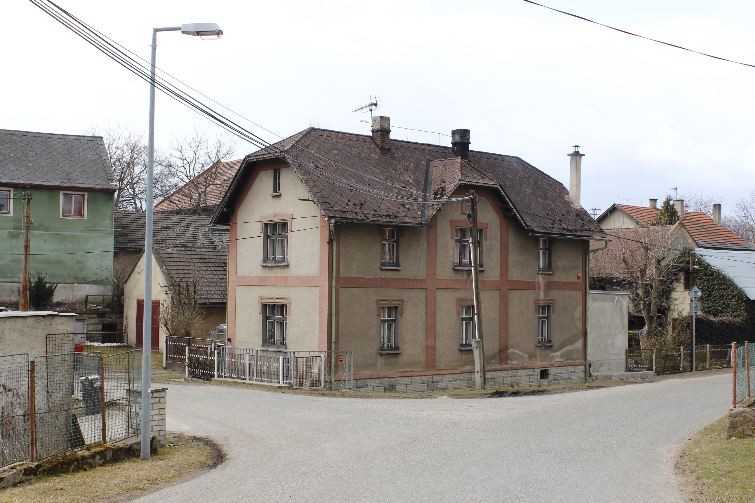 Dům číslo popisné 51 v Krásné Vsi na Mladoboleslavsku.